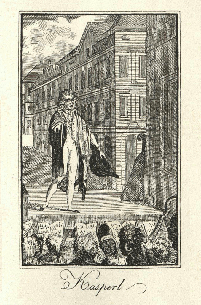 „Kasperl“. Unbezeichneter Stich aus dem Wiener Theater-Almanach auf das Jahr 1804. Sammlung Hugo Timig Johann La Roche (1735–1806), Austrian actor and writer